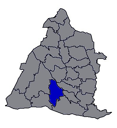 臺灣省彰化縣埤頭鄉。